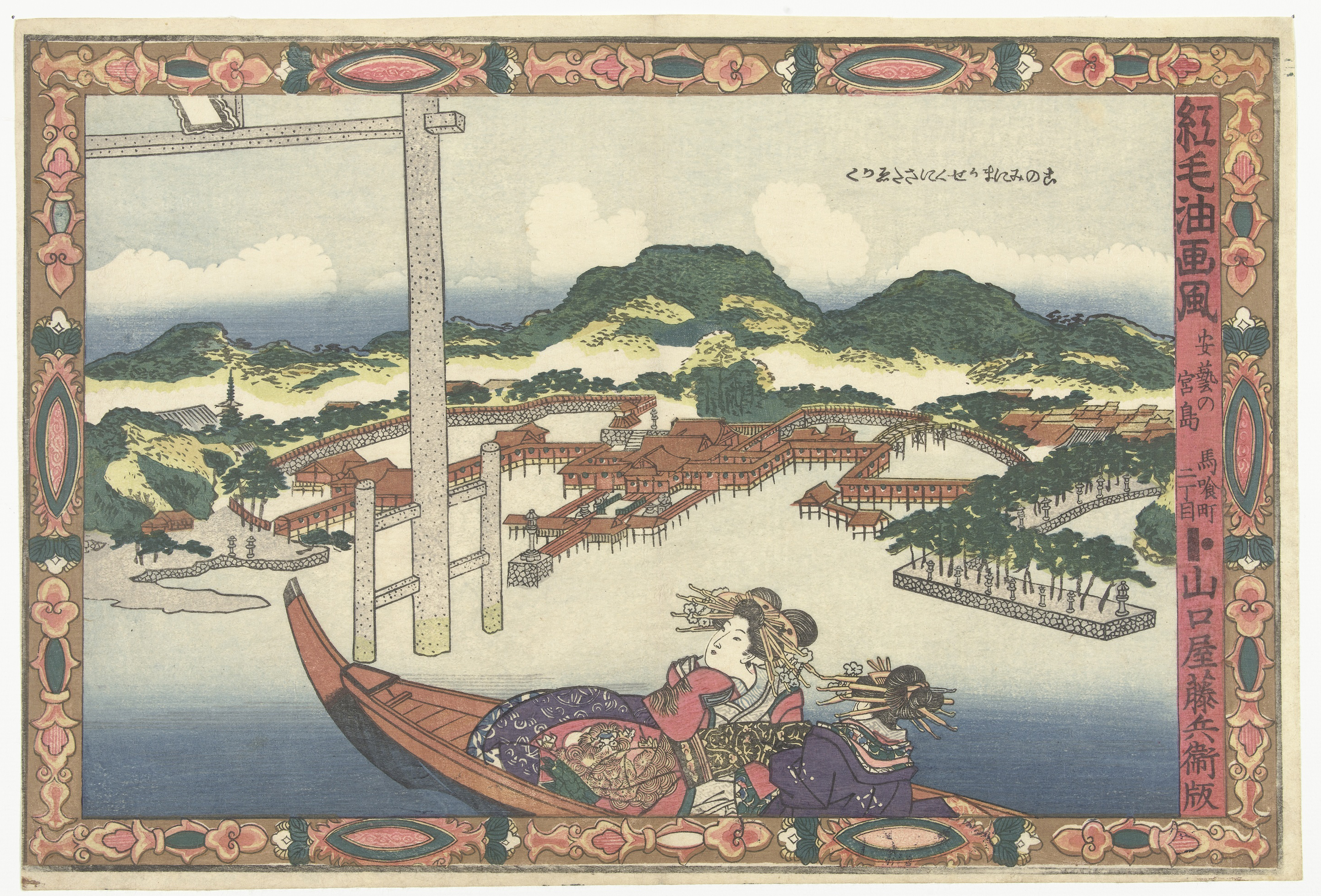 Twee vrouwen in een boot kijkend naar een grote tempelpoort; op de achtergrond een tempel complex omringd door bergen. De voorstelling is omkaderd met een rand waarin gestileerde bloemmotieven. Label Line: mentioned on object Kunisada (I) , Utagawa (1786 - 1865), ca. 1825, kleurenhoutsnede; lijnblok in zwart met kleurblokken Collection: prenten; Japan (collectie)